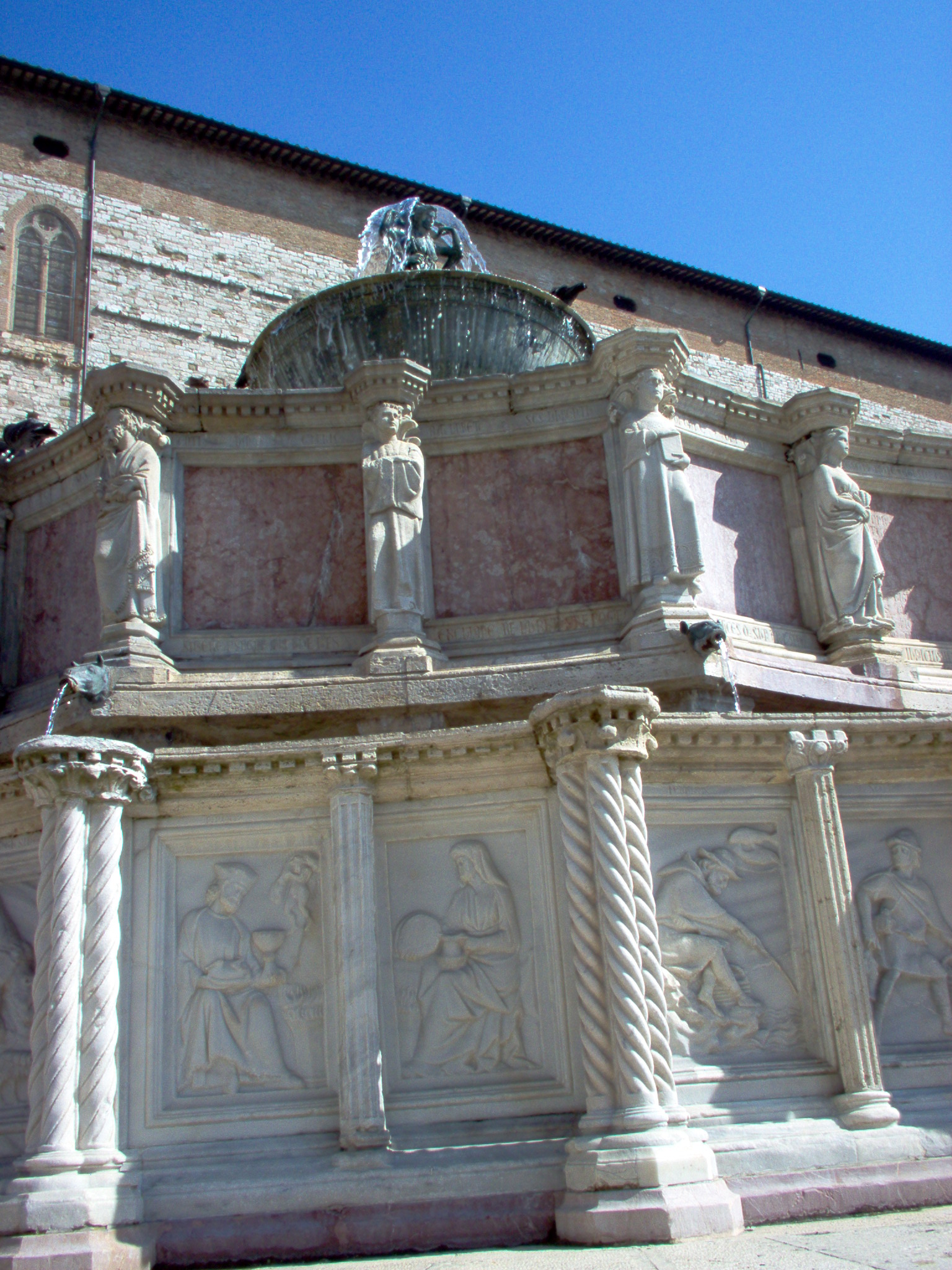 by Attilio Funel (April 3, 2006)